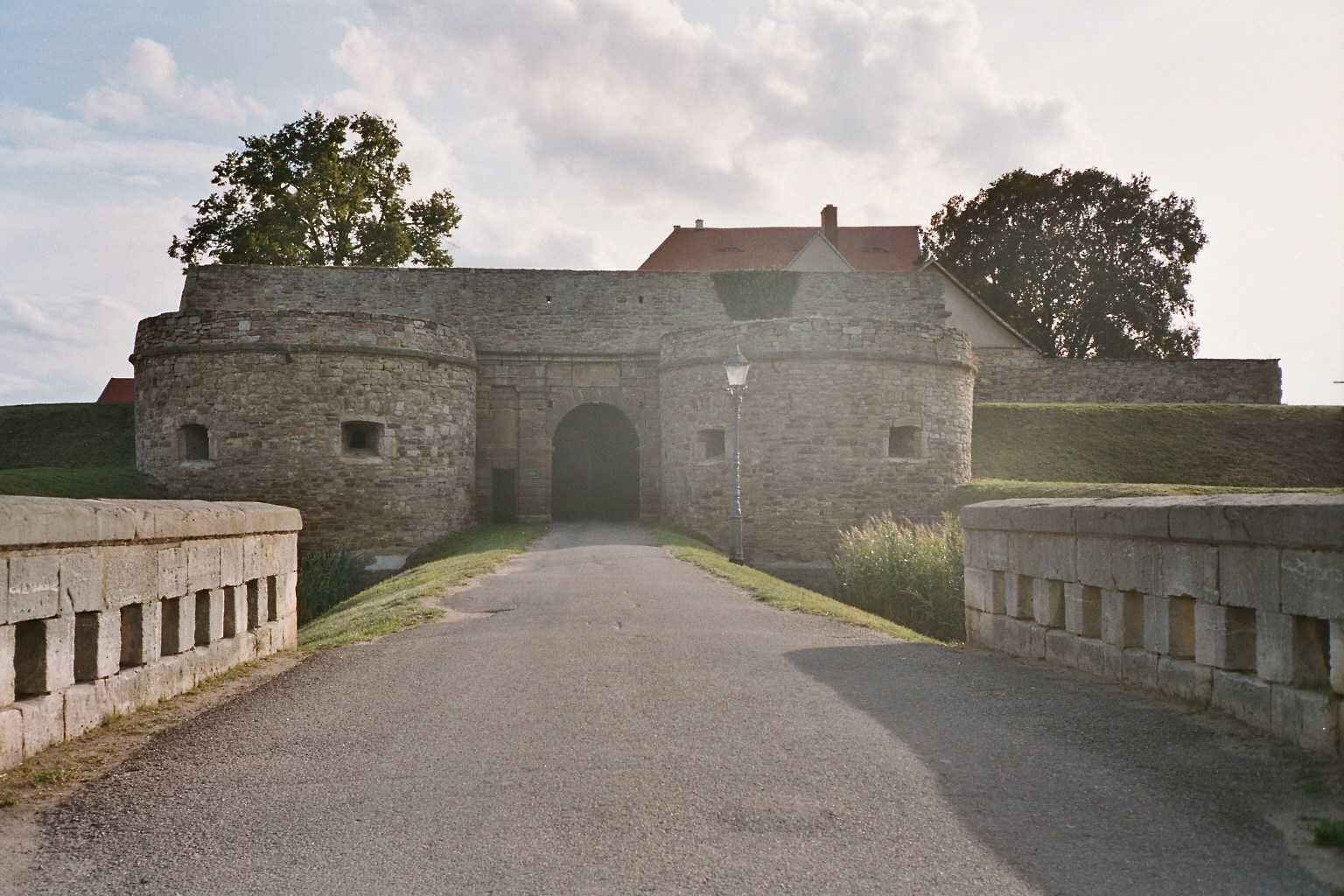 Das rondellierte Eingangstor der Festung Heldrungen